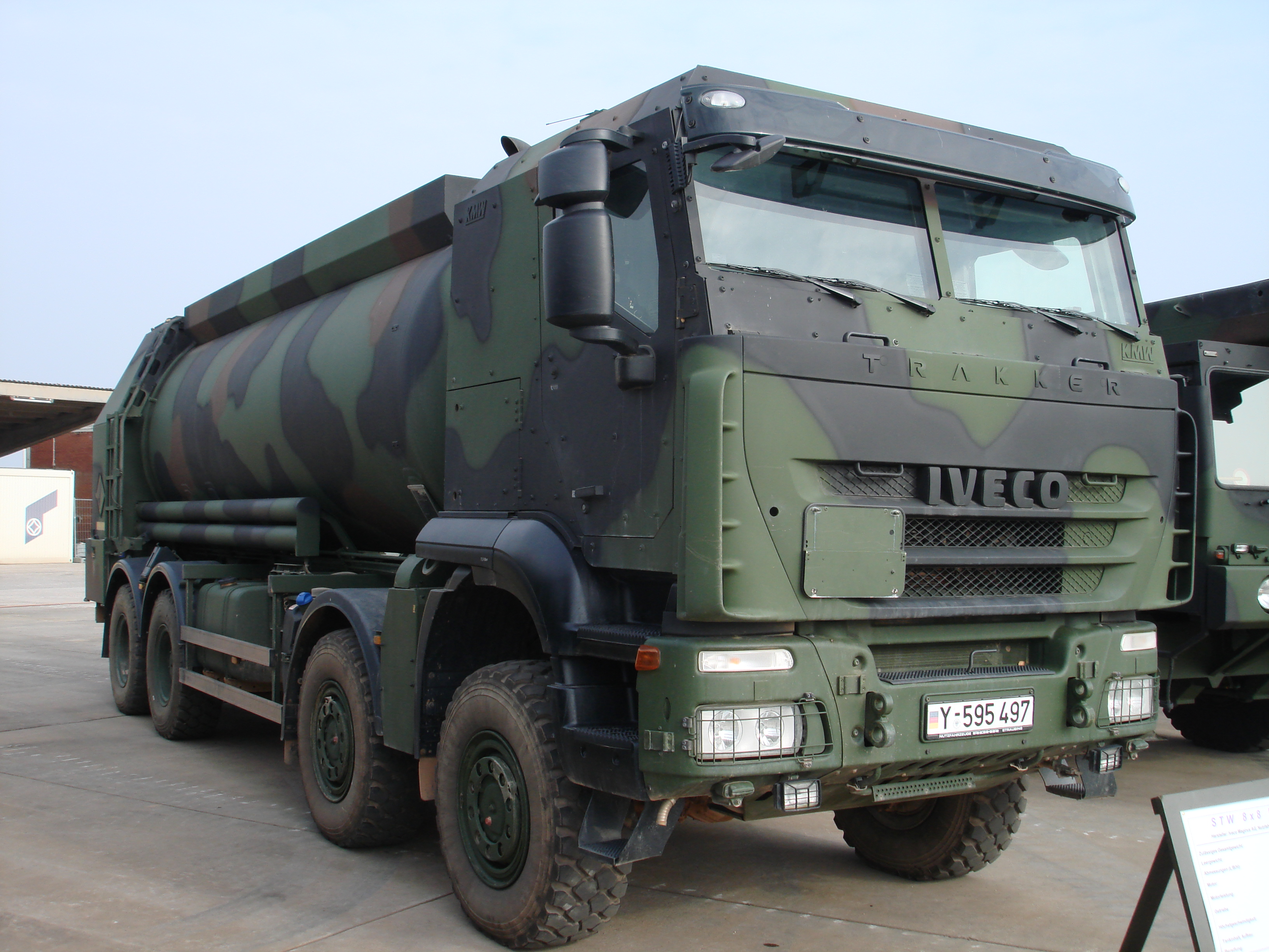 Straßentankwagen 8x8 FSA der Bundeswehr auf Iveco Trakker Fahrgestell. Er ist für die Versorgung von Verbänden vom Korps- bis Regimentsbereich sowie zur Betankung von Hubschraubern vorgesehen. Der Nutzinhalt im Frieden liegt bei 16400 Liter und kann im Ernstfall bis zu 18000 Liter betragen. Die Fahrerkabine hat einen ballistischen Schutz Level 3 und Minenschutz Level 3b.